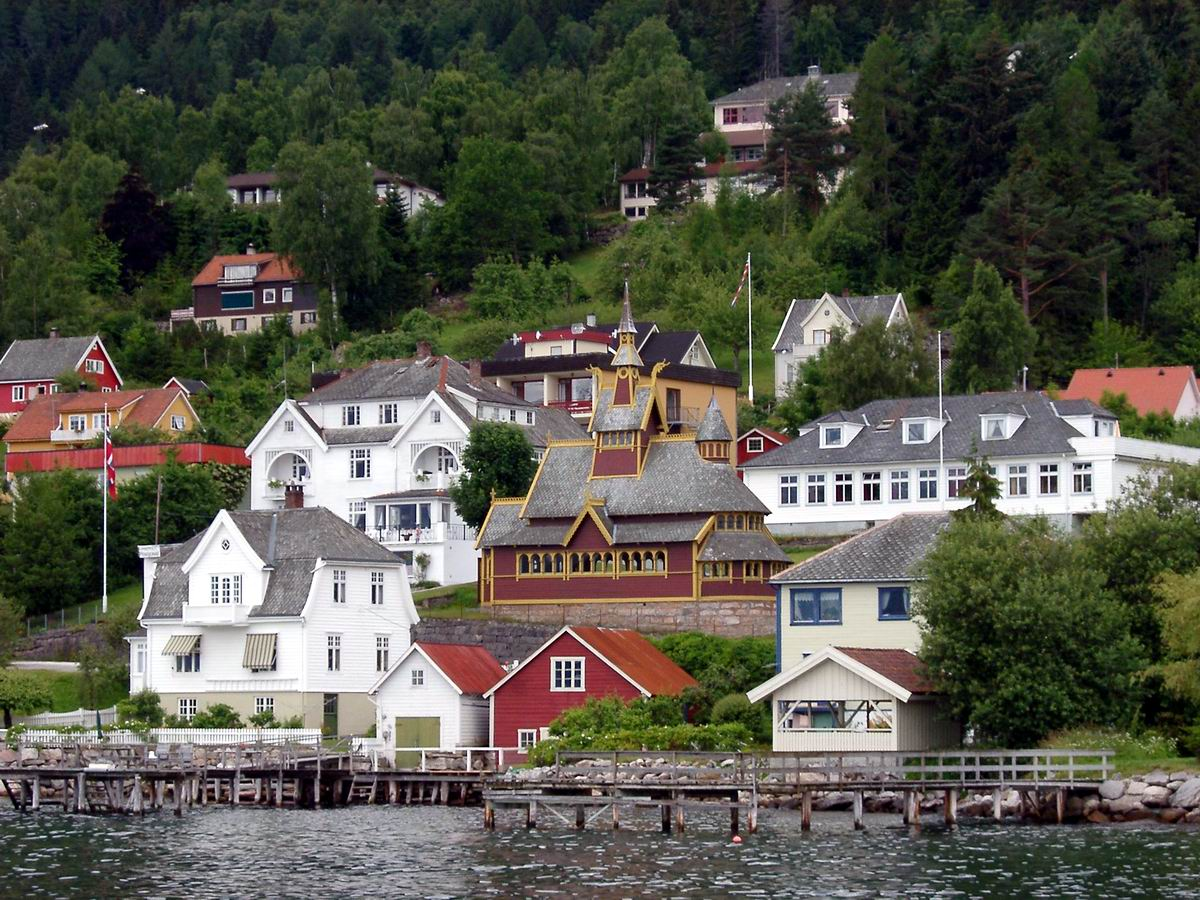 Balestrand Norwegen; Blick auf St. Olaf´s Church